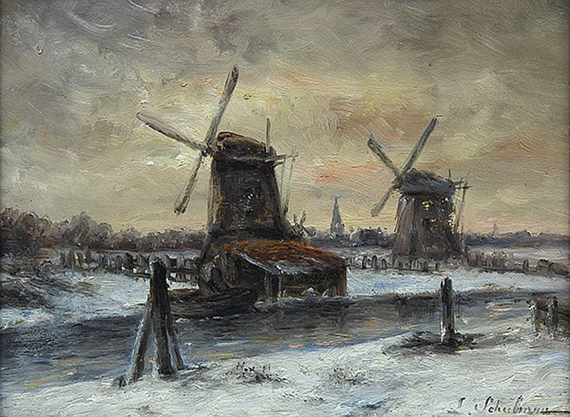 Molens aan de Laren